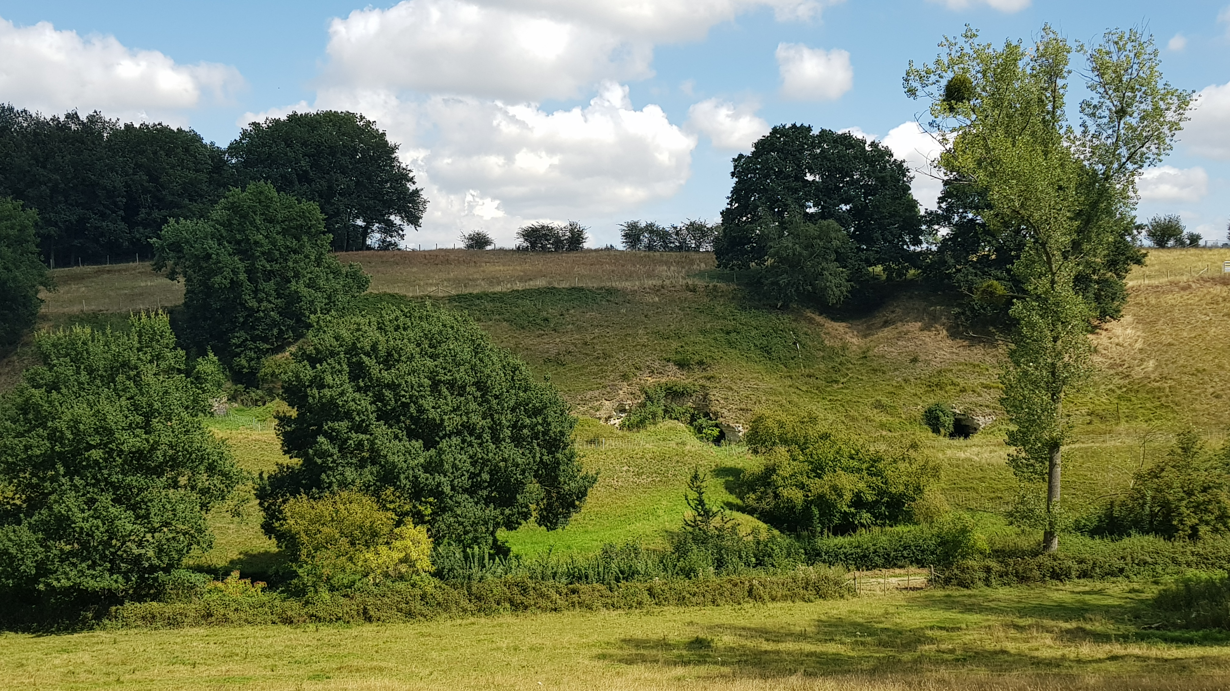 Gasthuisdelgroeve I + II (oost) + II (west), Bemelen, Nederland